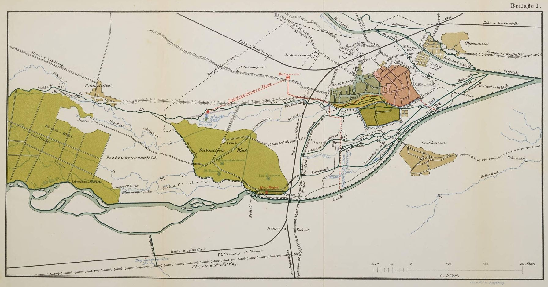 Hydrologische Karte von Augsburg und seiner Umgebung zur Planung der Grundwassernutzung. Aus "Die Trinkwasserverhältnisse der Stadt Augsburg"